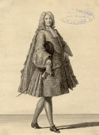 Yves, marquis d'Alègre, maréchal de France (1653-1733)